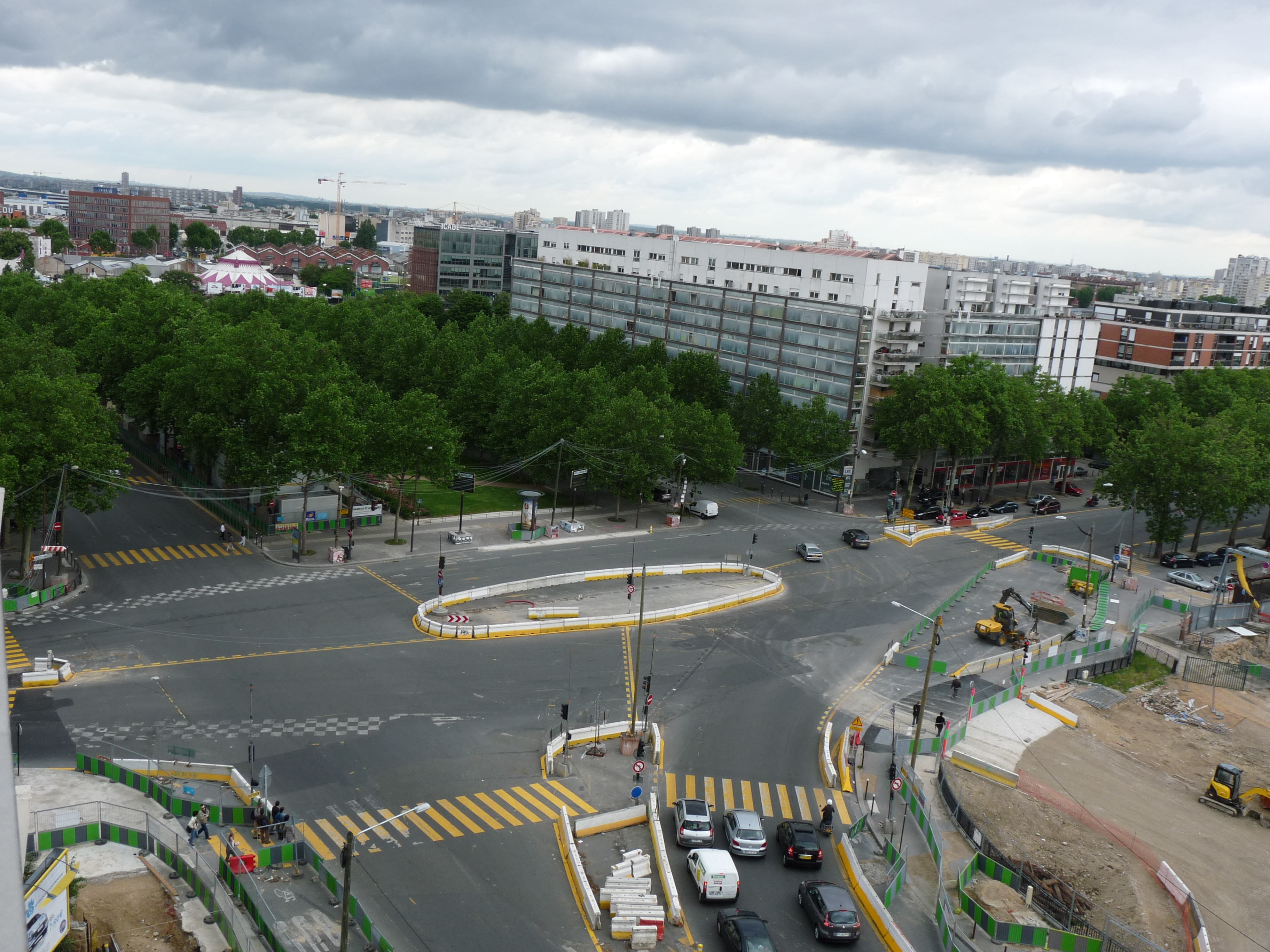 La porte d'Aubervillers à Paris, vue prise du toit du bâtiment à l'angle du boulevard Ney avec la rue d'Aubervilliers. À droite le boulevard Macdonald avec le chantier de l'extension du tram des Maréchaux.